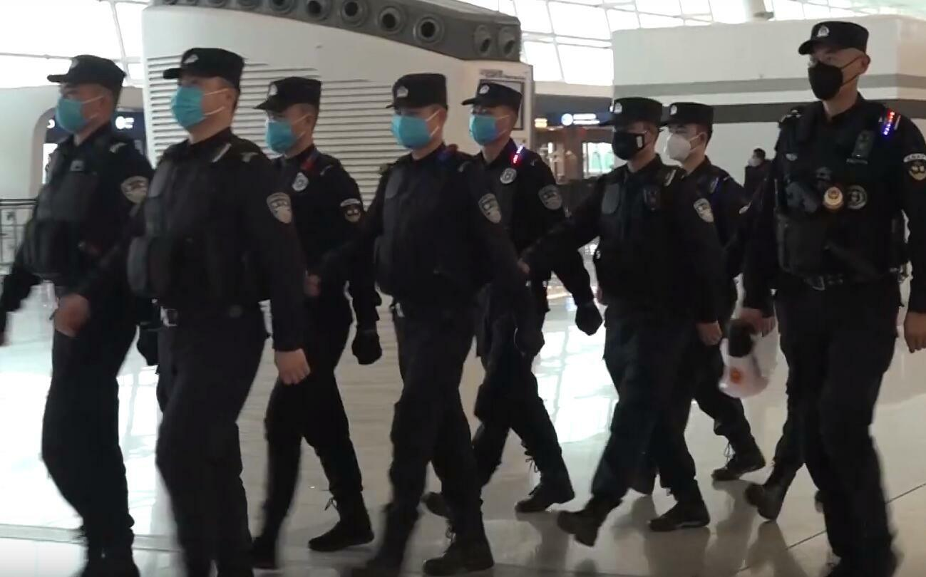 武汉肺炎疫情爆发后，天河机场内警察戴口罩巡逻